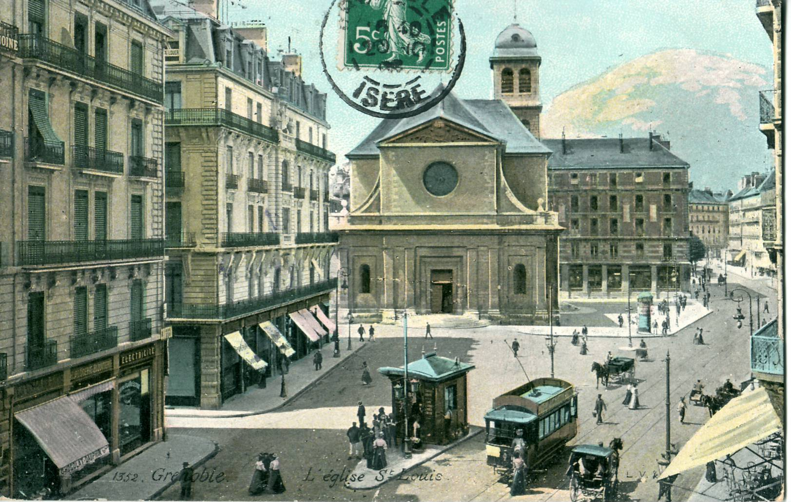 Carte postale ancienne éditée par LV & Cie, N° 1352GRENOBLE : L'église Saint-Louis